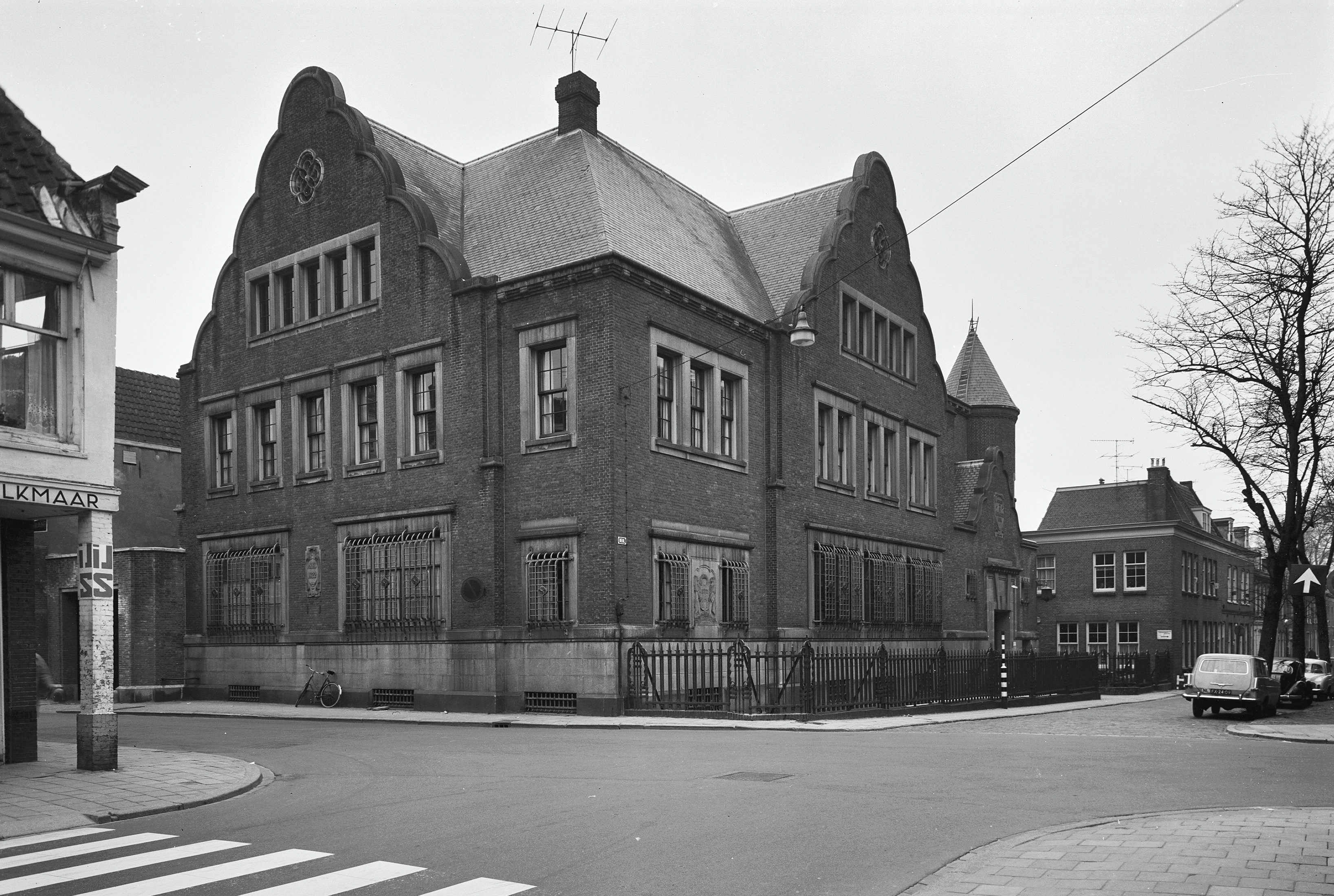 hoek Koorstraat